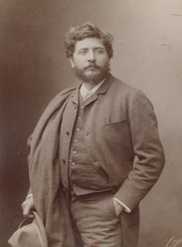 Jean-Joseph Carriès sculpteur